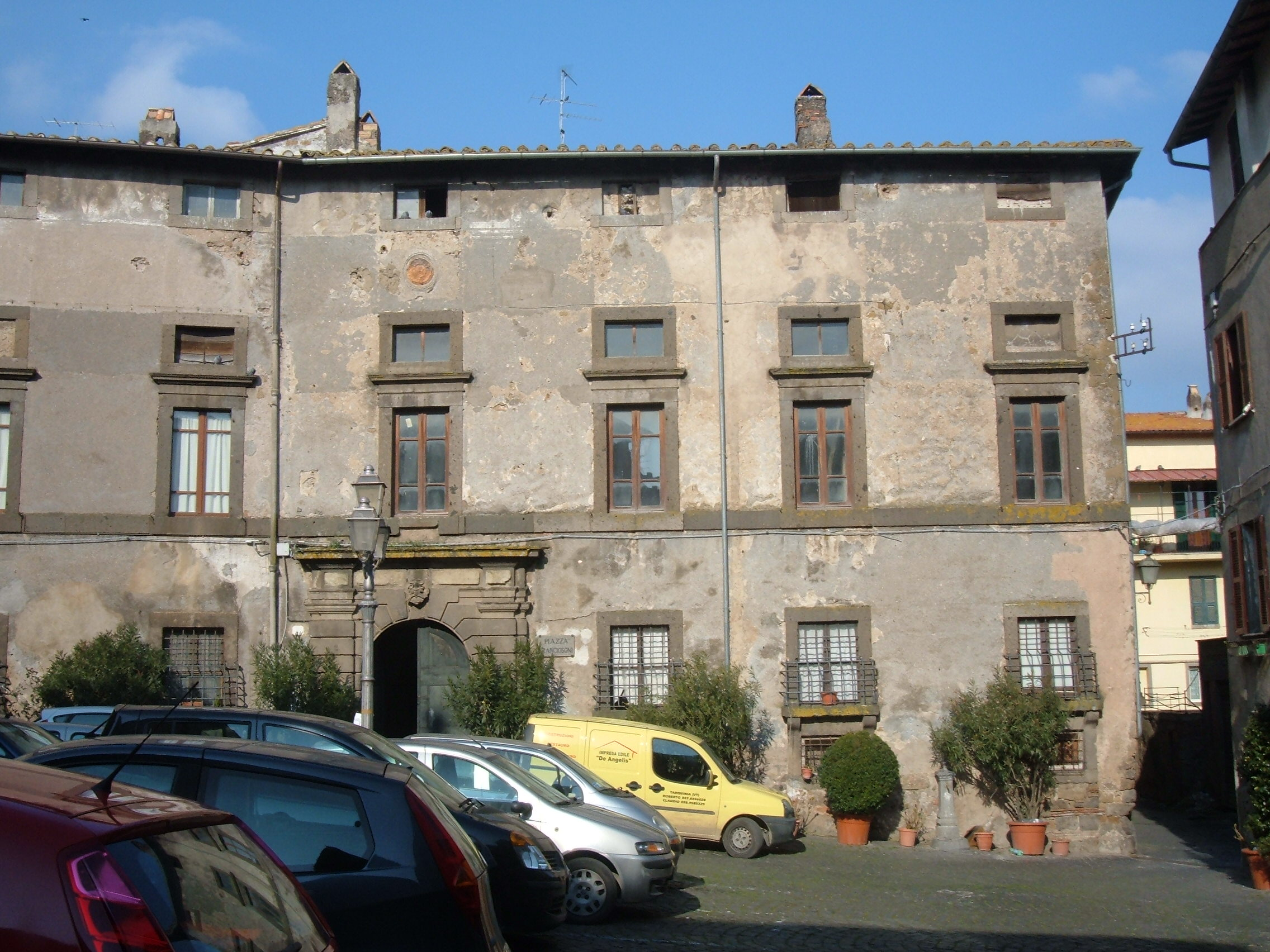 Palazzo Franciosoni, di scuola vignolesca, costruito tra il XV e il XVI sec.